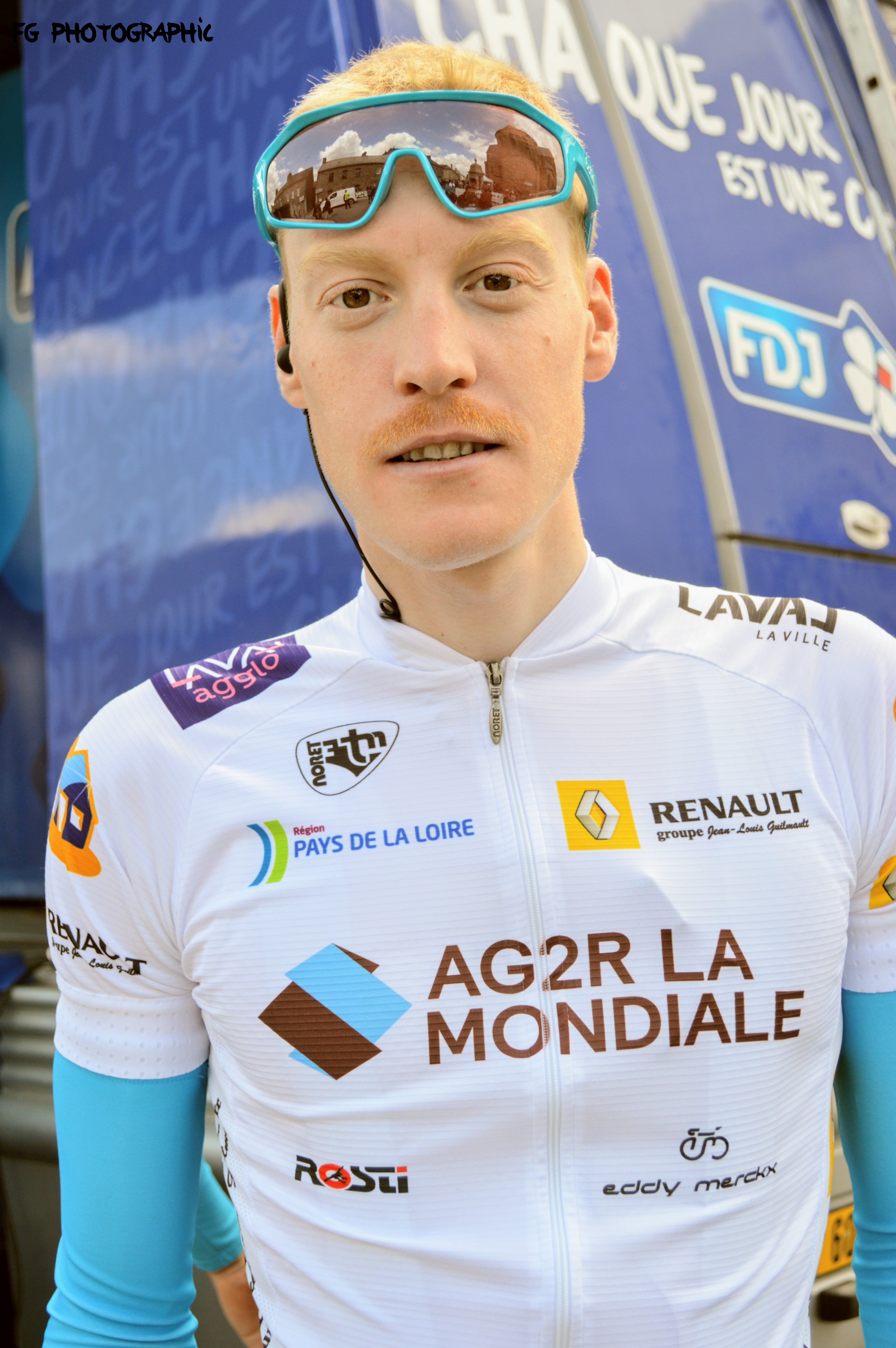 Dorian GODON portant le maillot du meilleur jeune sur les boucles de Mayenne